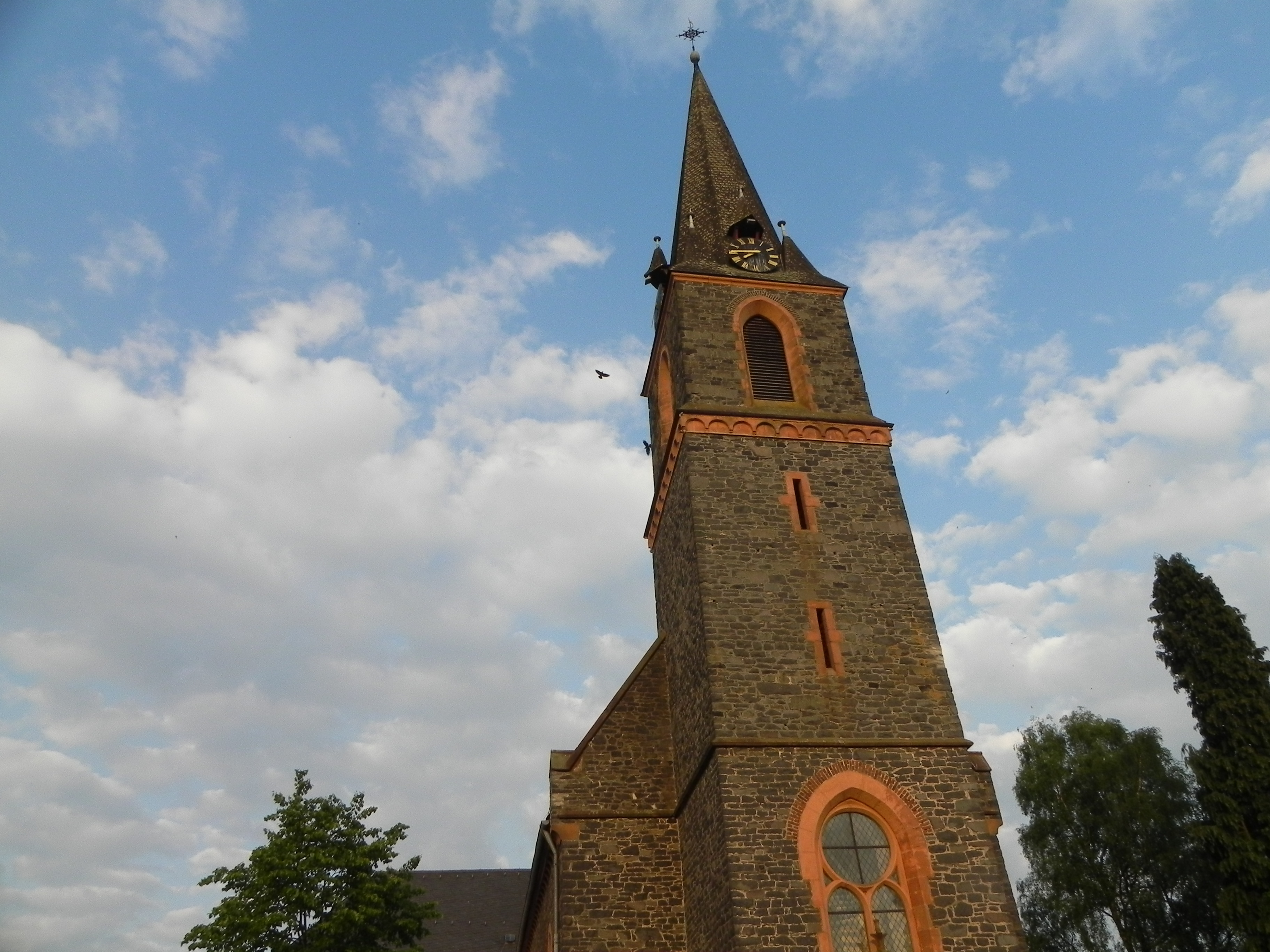 Die katholische, neohistoristische Pfarrkirche in Rennerod im hohen Westerwald, vor ihrer erneuten Umgestaltung 2011. Hier zunächst nur vor der Enthistorifizierung des umgebenden Geländes. Um Anschluss an den "Seelenmarkt" zu halten, wurde sie kurz darauf mit einem "Neues Pfarrheim" genannten Zweckbau verschandelt. Man möchte mit der "Diakonie", auf dem "freien Markt", gerne herzlich konkurrieren. Aber immer unter Tarif. Es sei daran erinnert, dass die ganze Angelegenheit Kirche, auch unter dem Kaiser, immer nur ein Fake war, aber alle, die unter des Führers Westerwaldlied so gelitten haben, sollten die Vorgänge hier sehr genau beobachten. Man kann sehen, dass da wo ein hoher Turm ist, immer auch Raubvoegel unterwegs sind, und sich das nicht ändert.